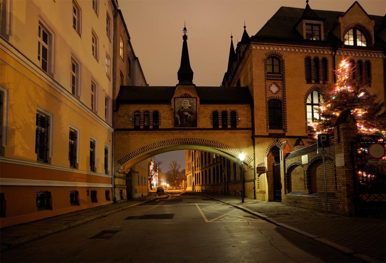 Wrocław Śródmieście, ul. św. Józefa 1-3 - zespół klasztorny Zgromadzenia Sióstr św. Elżbiety (zabytek nr 197/A/03/1-3)